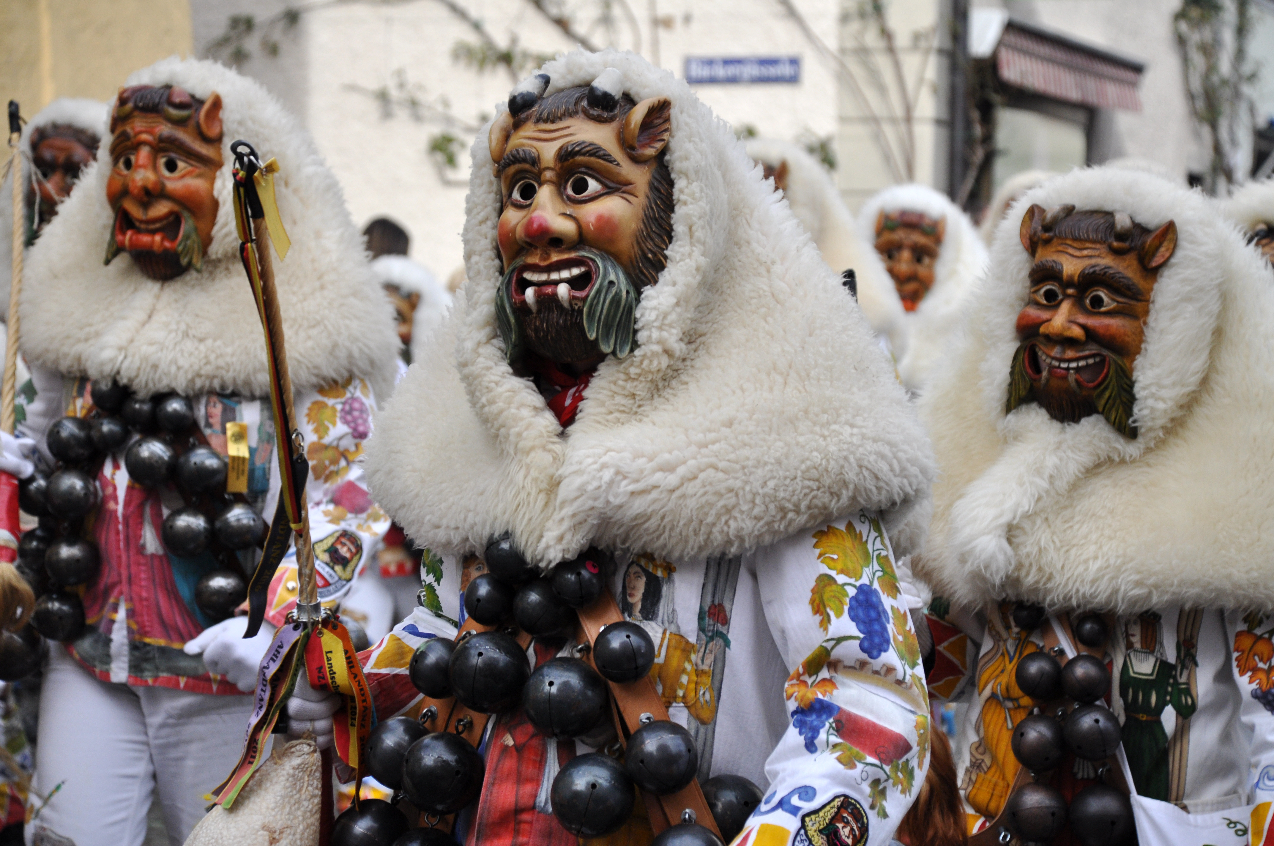 Narrenzunft Rottenburg; Narrenfigur: Ahland Fotografiert beim Großen Narrentreffen der Vereinigung Schwäbisch-Alemannischer Narrenzünfte (VSAN) in Lindau; Narrensprung am Sonntag, 24. Januar 2016.